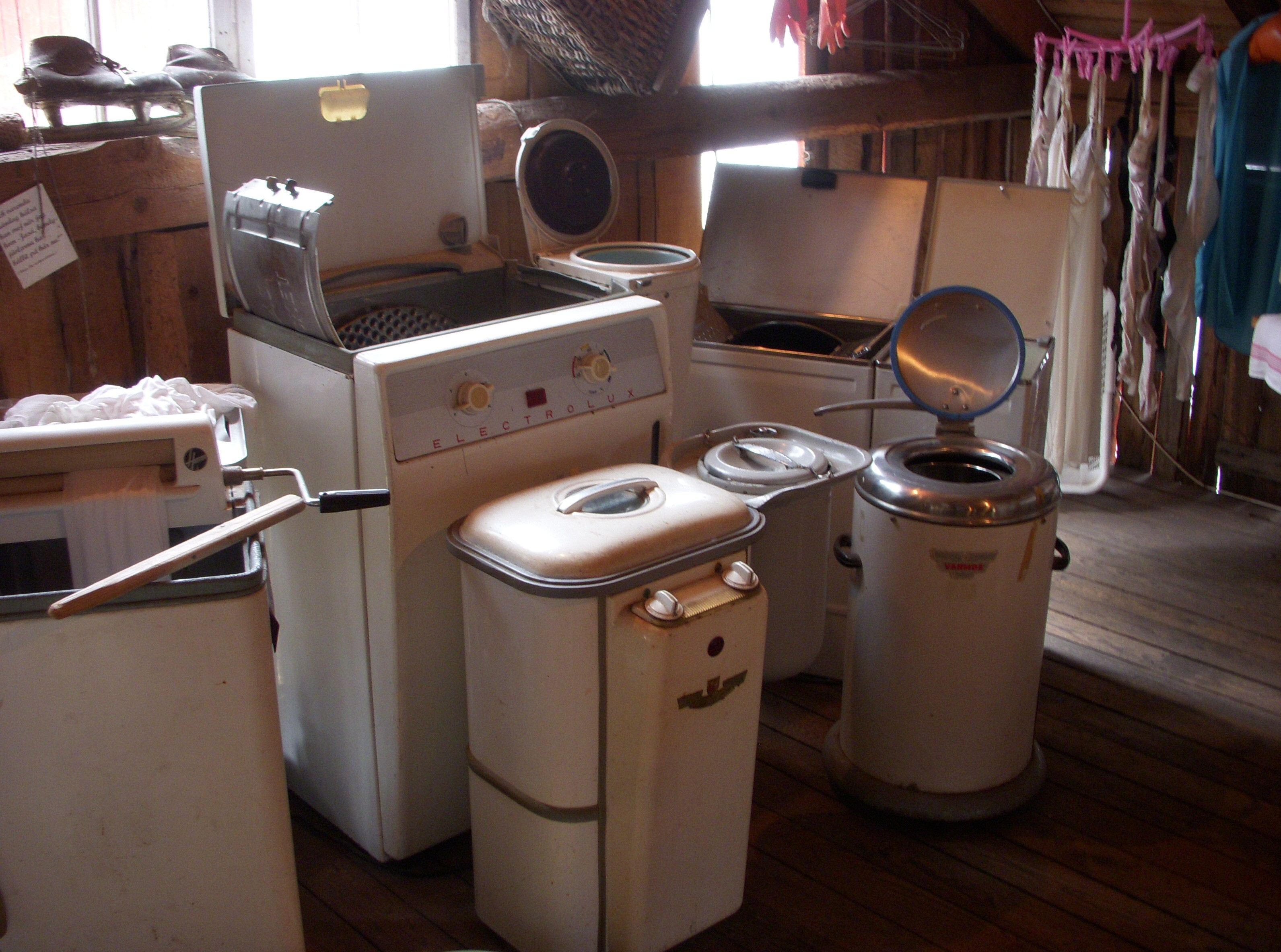 Hagalunds Tvätterimuseum i Huddinge